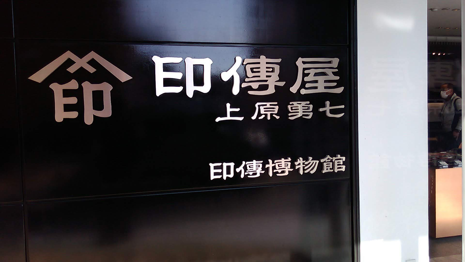 印傳博物館 - 入口看板（甲府市）